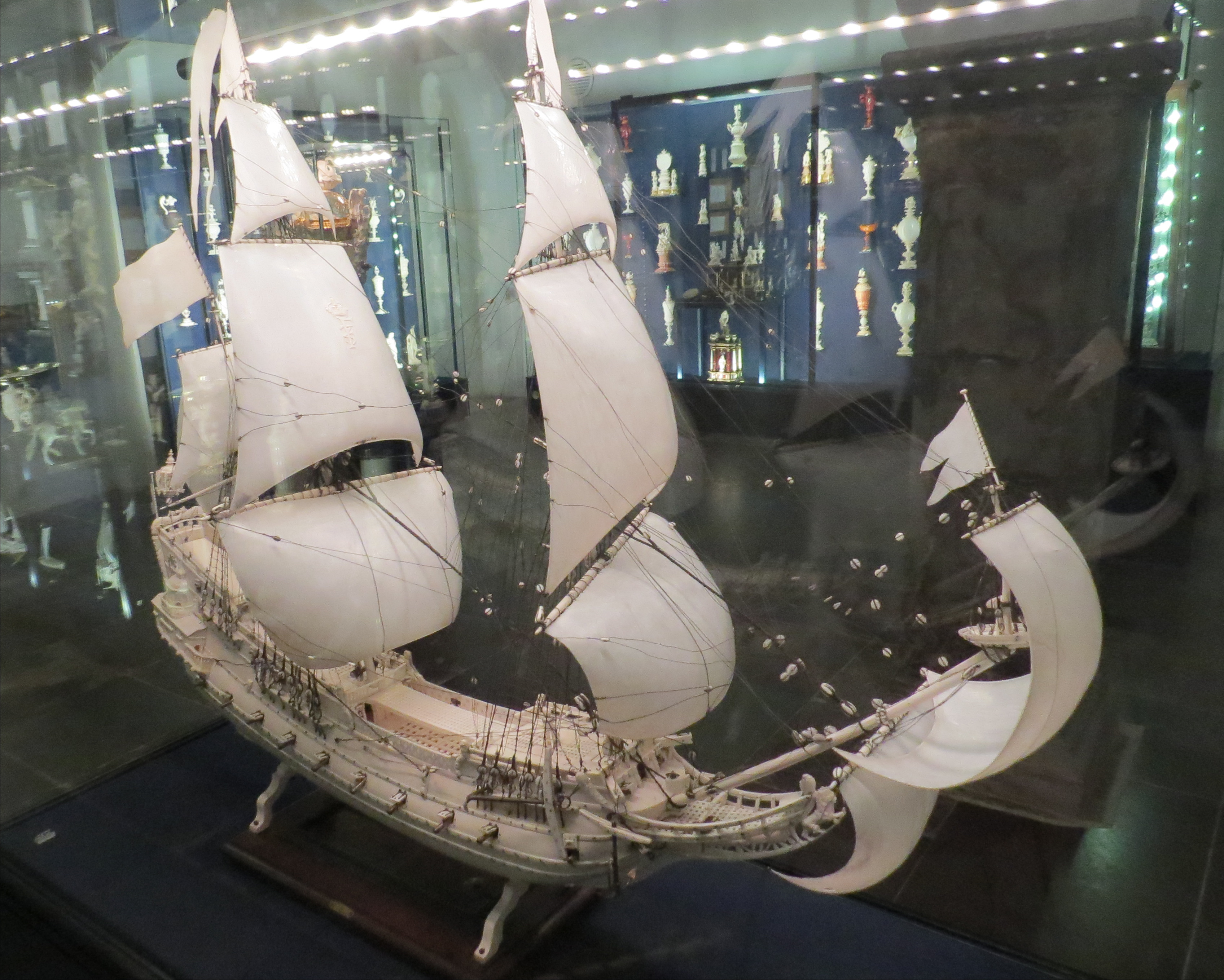 Model af Fregatten Norske Løve, elfenben og sølv, udskåret af Jacob Jensen Normand til Frederik III af Danmark og Norge, Rosenborg Slot, København